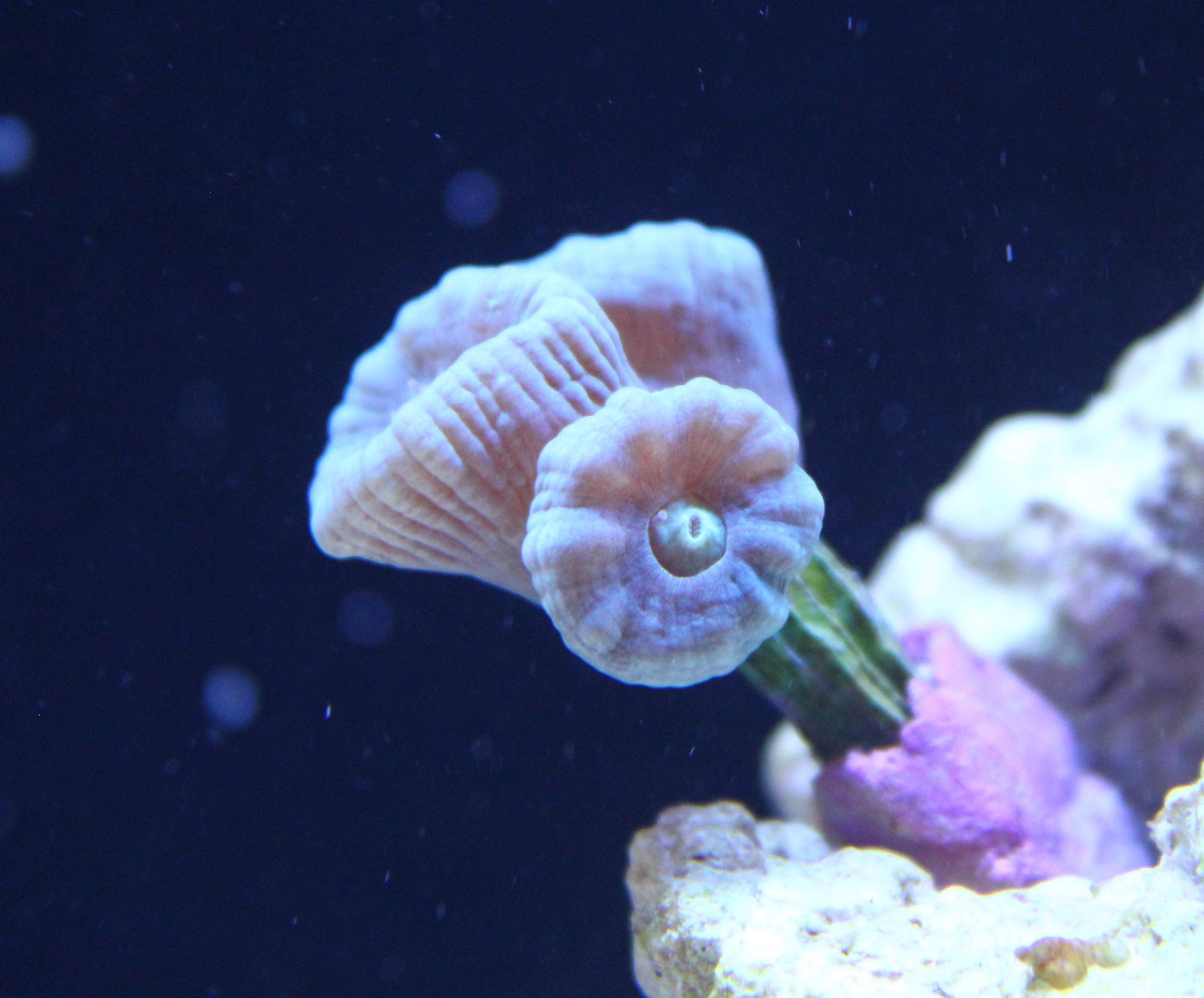 Pequeña colonia de Caulastraea compuesta de tres coralitos